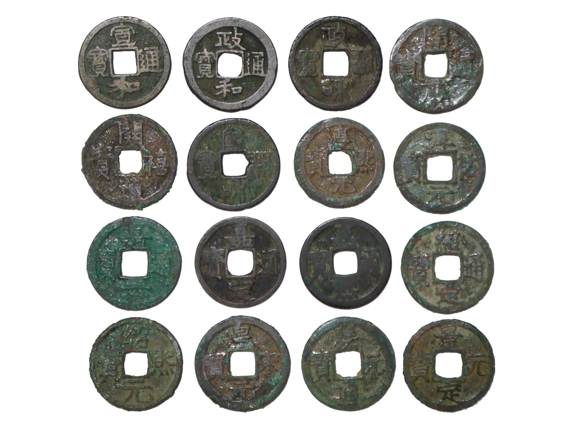 南宋銭の画像